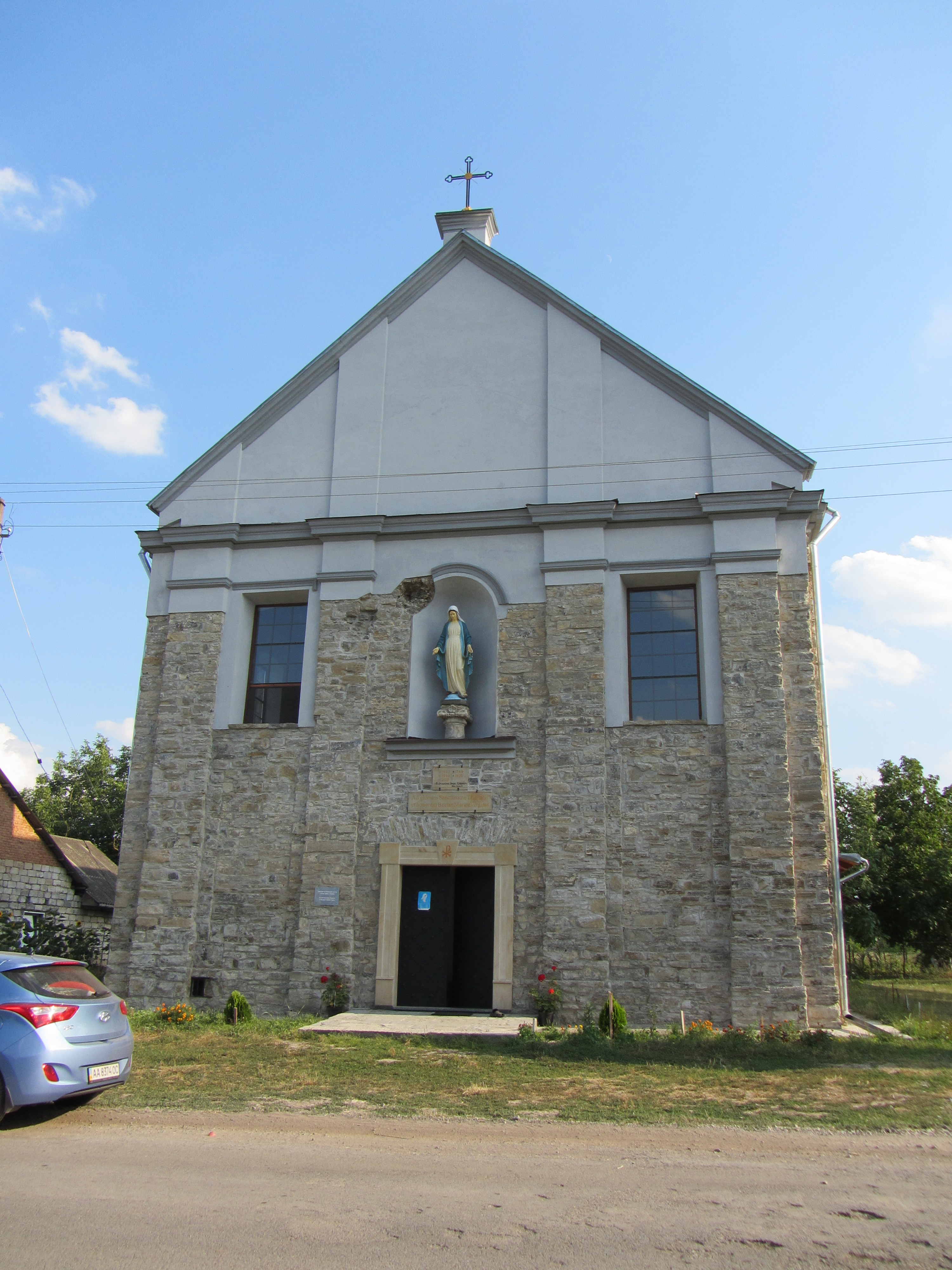 Kościół po restauracji w 2014r.